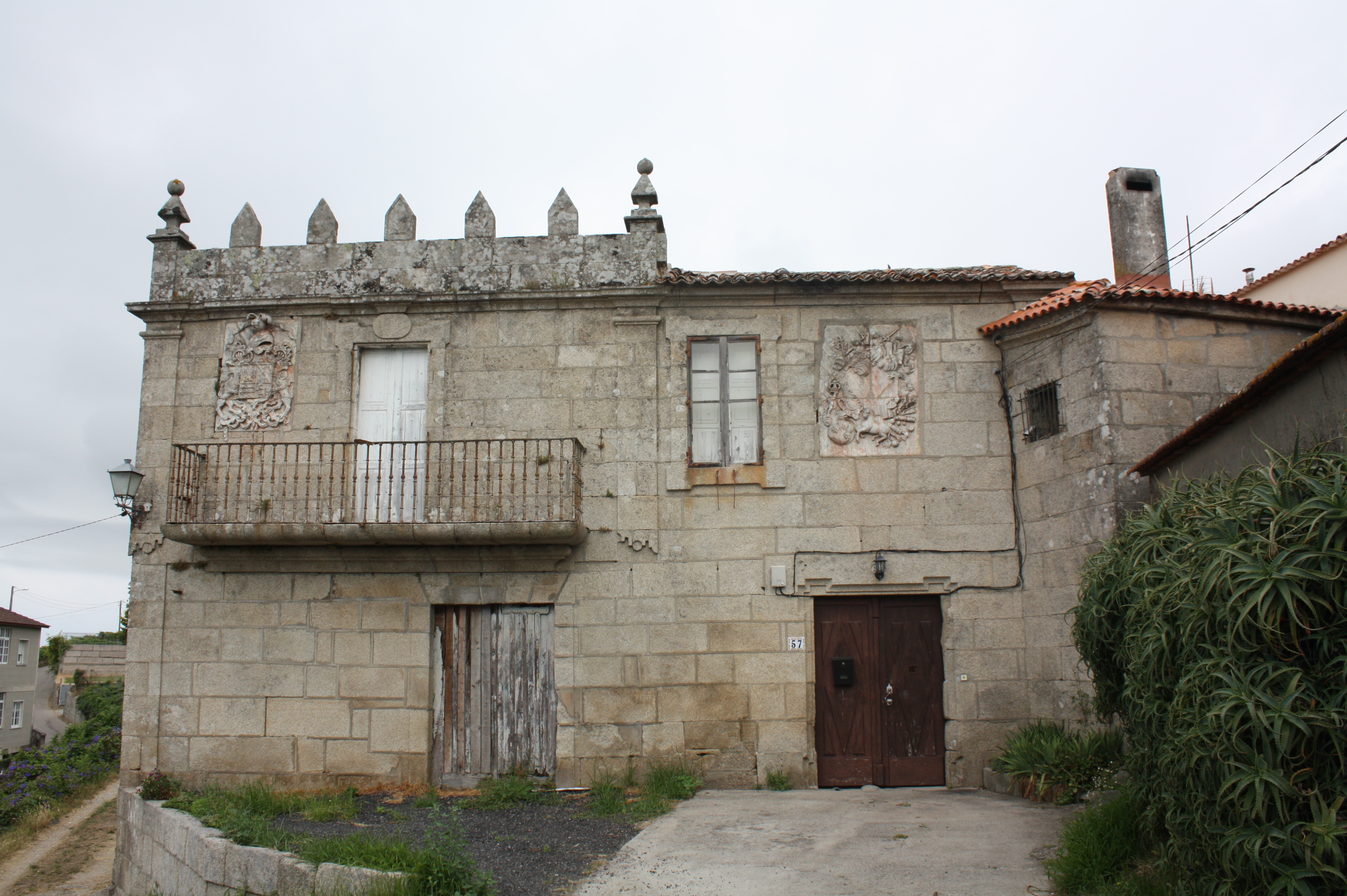 Pazo de Padriñán, da primeira metade do século XVIII, na parroquia do mesmo nome do concello de Sanxenxo (Pontevedra)